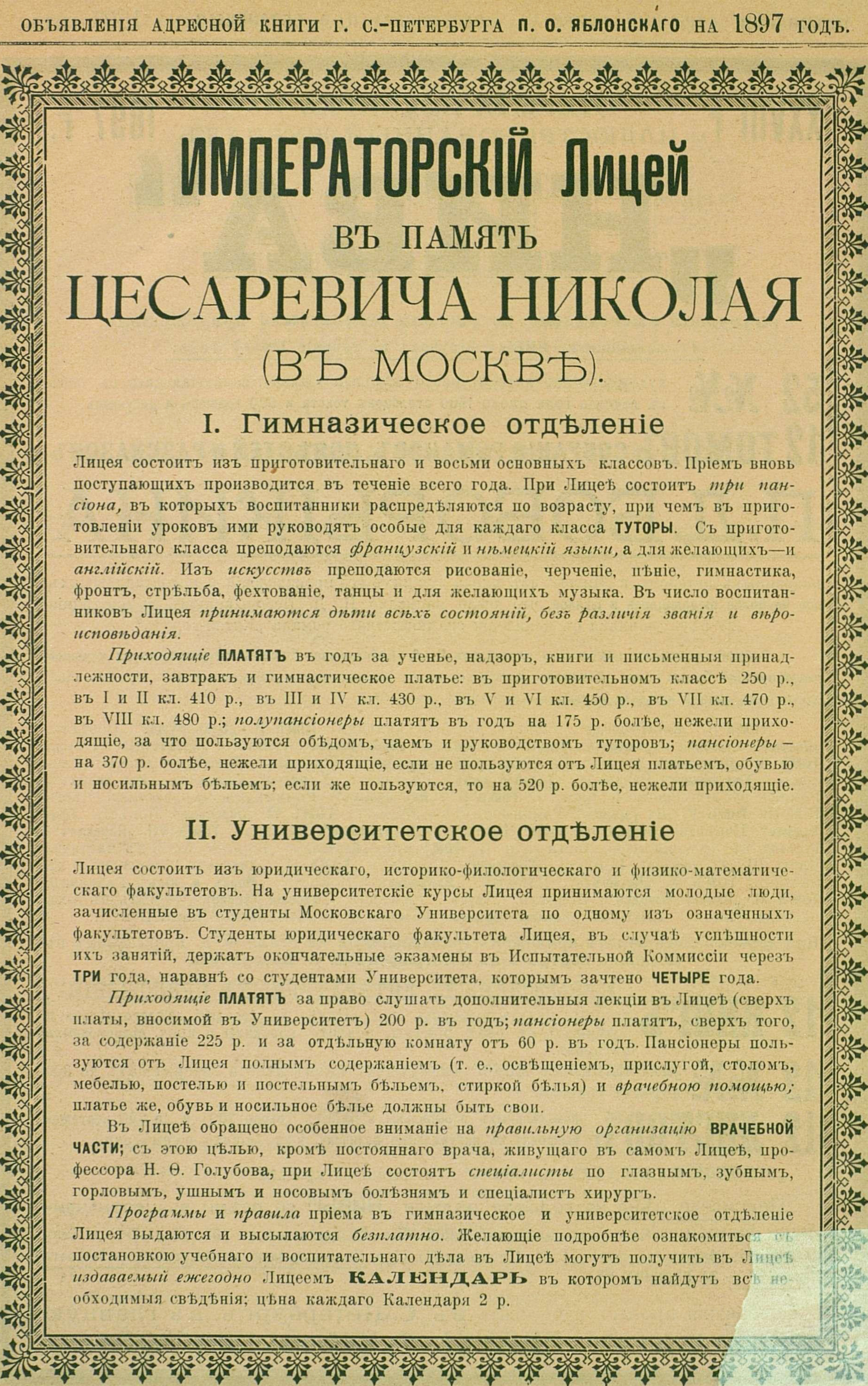 Реклама императорского лицея в память цесаревича Николая, 1897 год.